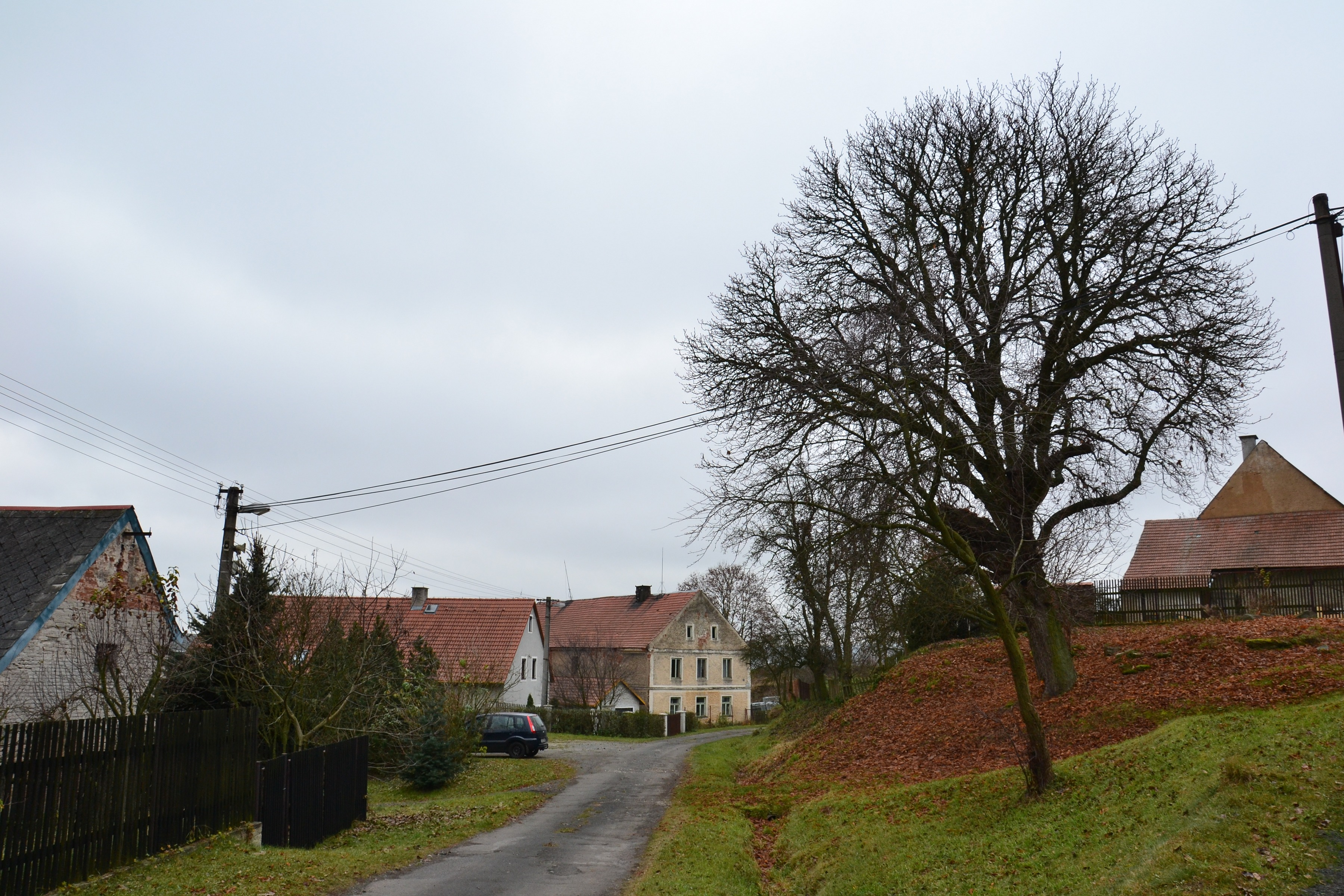 Kolešov - náves